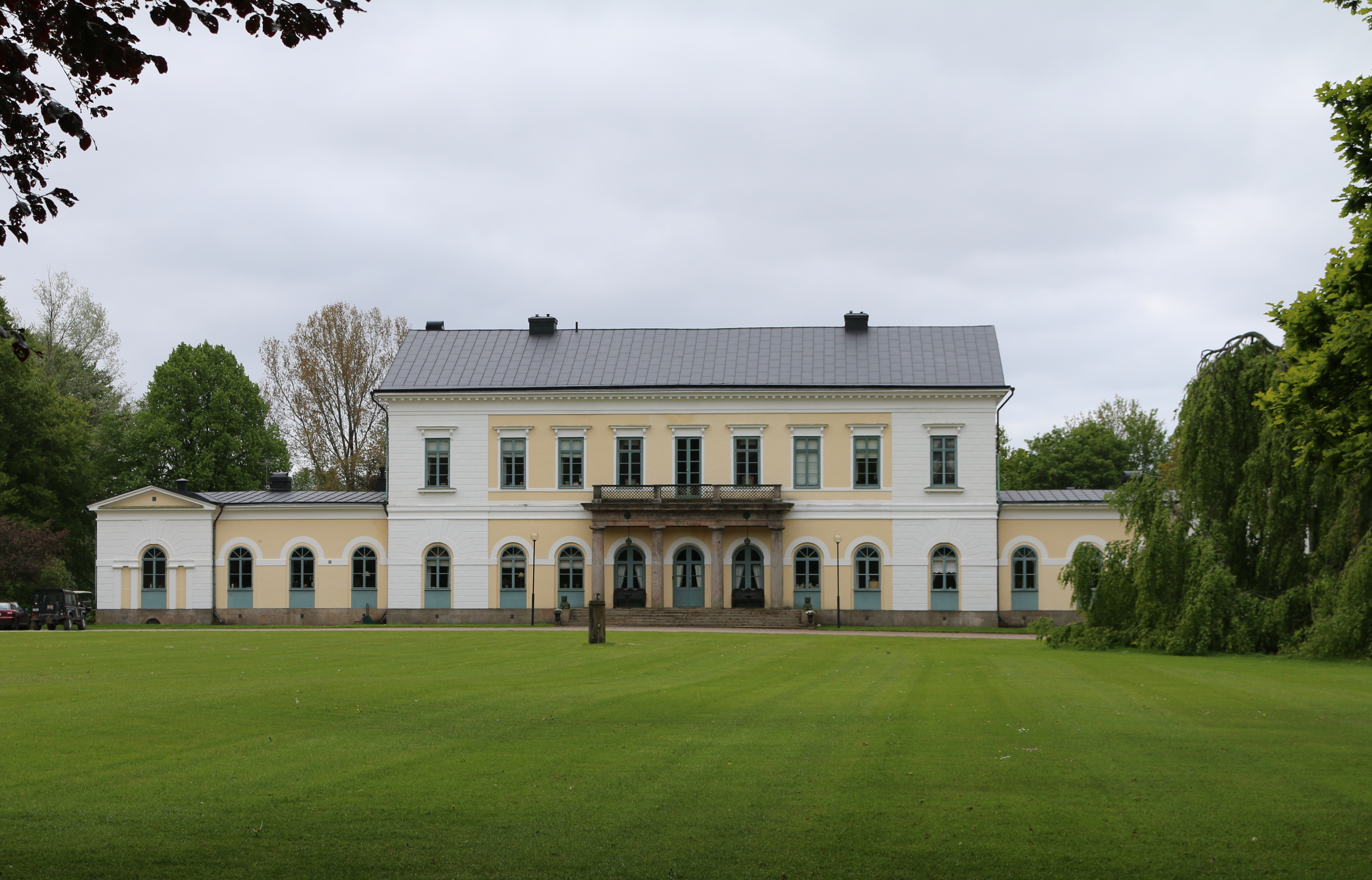 Sperlingsholms slott